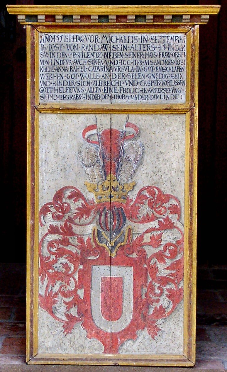 Epitaph des Jobst von Randow in Loburg von ca. 1553 Text auf der Tafel: ANO ·1551·14·TAG·VOR·MICHAELIS·IN·SEPTEMBER IS·IOST·VON·RANDAW·SEIN·ALTERS·45·IN·DER SWINDEN·PESTILENTZ·NEBEN·SEINER·HAUS·FRAW·ORSEL VON·LINDENA·AUCH·SONEN·VND·TOCHTER·ALS·ANDRES·IOST- KHEN·ANNA·RAHEL·CATARINA·VRSVLA·IN·GOT·ENSCHLAFEN WELCHEN·GOT·WOLLE·AN·DER·SELEN·GNEDIG·SEIN VND·HINDER·SICH·ALBRECHT·VND·CASPER·VORLASSEN GOTT·HELFE·VNS·ALLEN·EINE·FROLICHE·AVFFERSEHVNG· SEIND·BEGRABN·HINDER·DEM·THORM·VNDER·DER·LINDE